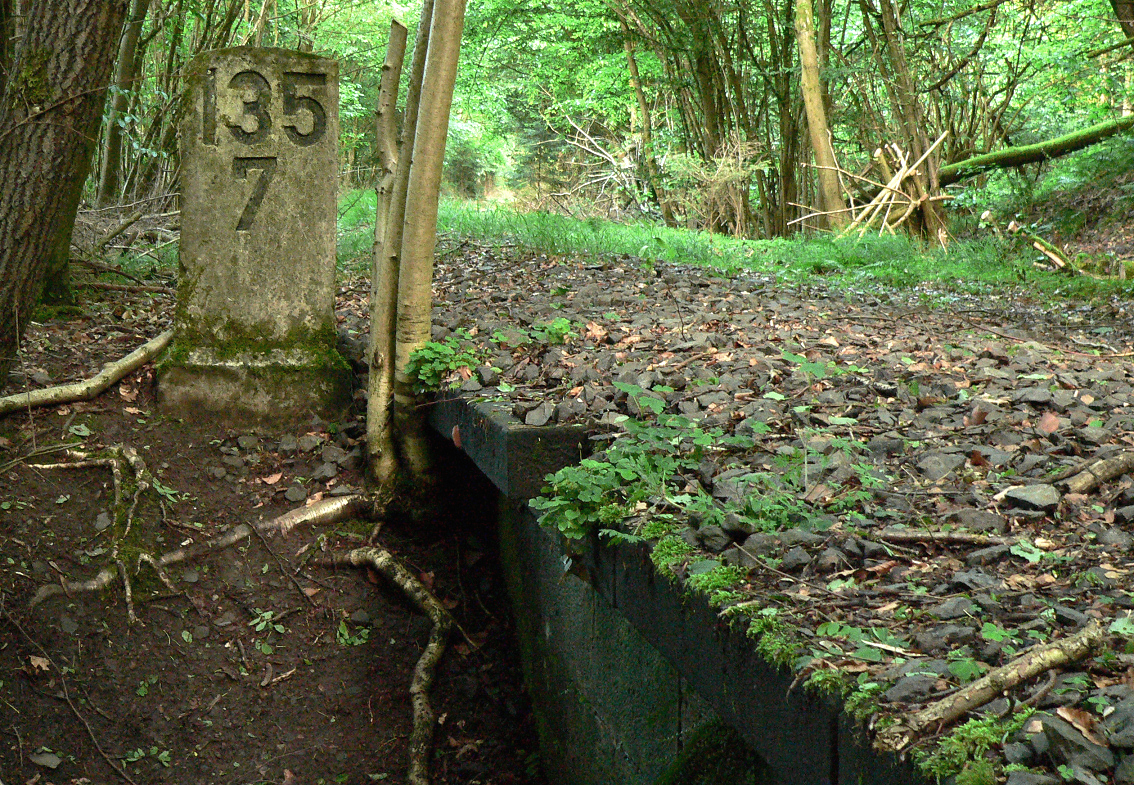 Strecken km 135 7 am Nordost Portal des Volkmarshäuser Tunnels